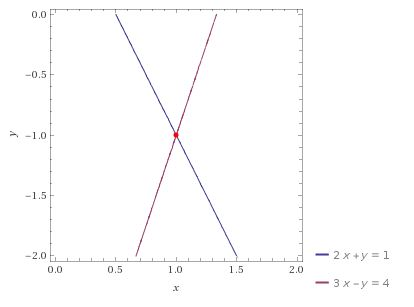 Ekuazio linealen sistema